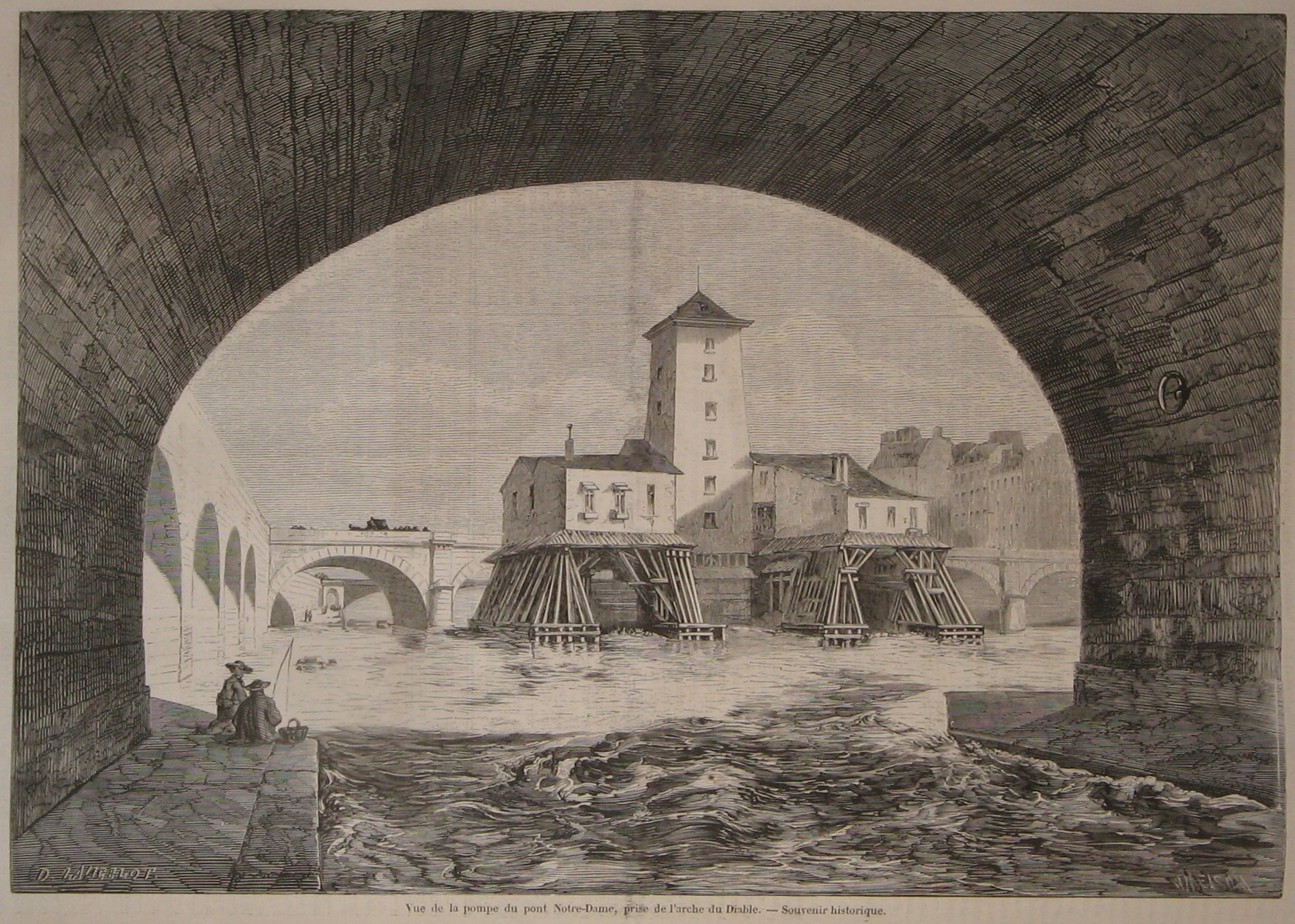 Vue de la pompe du pont Notre-Dame, prise de l'arche du Diable. – Souvenir historique.